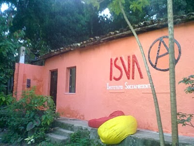 Biblioteca Comunitária de Valéria Prof José Oiticica, Fundada por Antônio Fernandes Mendes, Junto com a Comunidade.